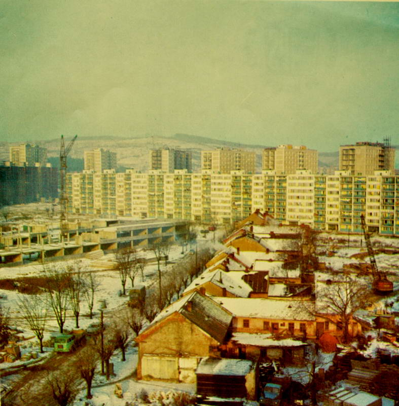 Nam. Ladislava Novomeskeho Kosice